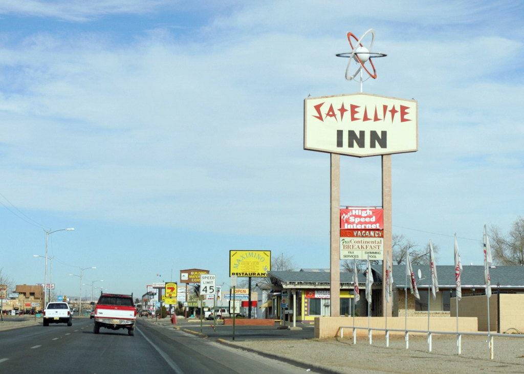 Alamogordo, New Mexico